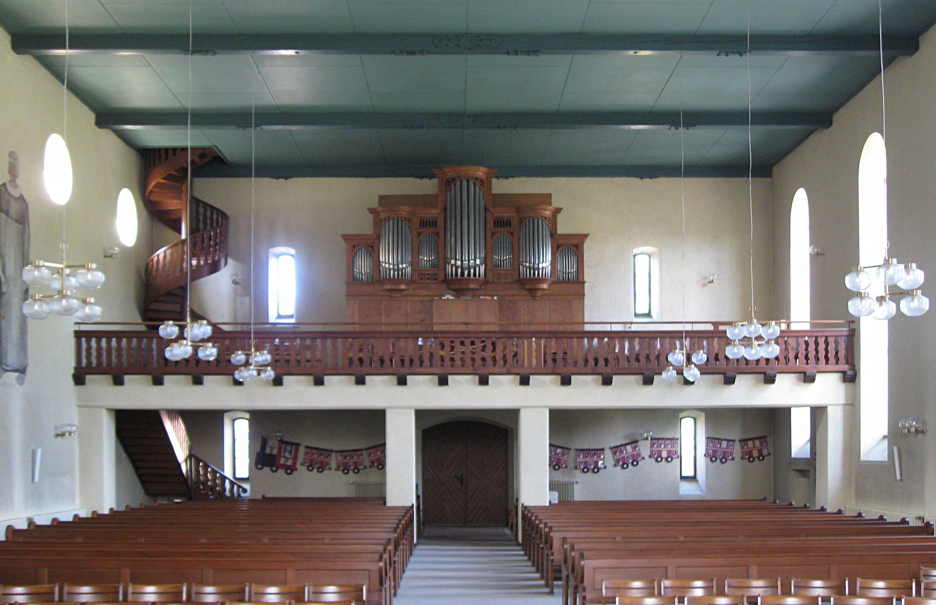 Fassberg Kirche Blick zur Orgelempore